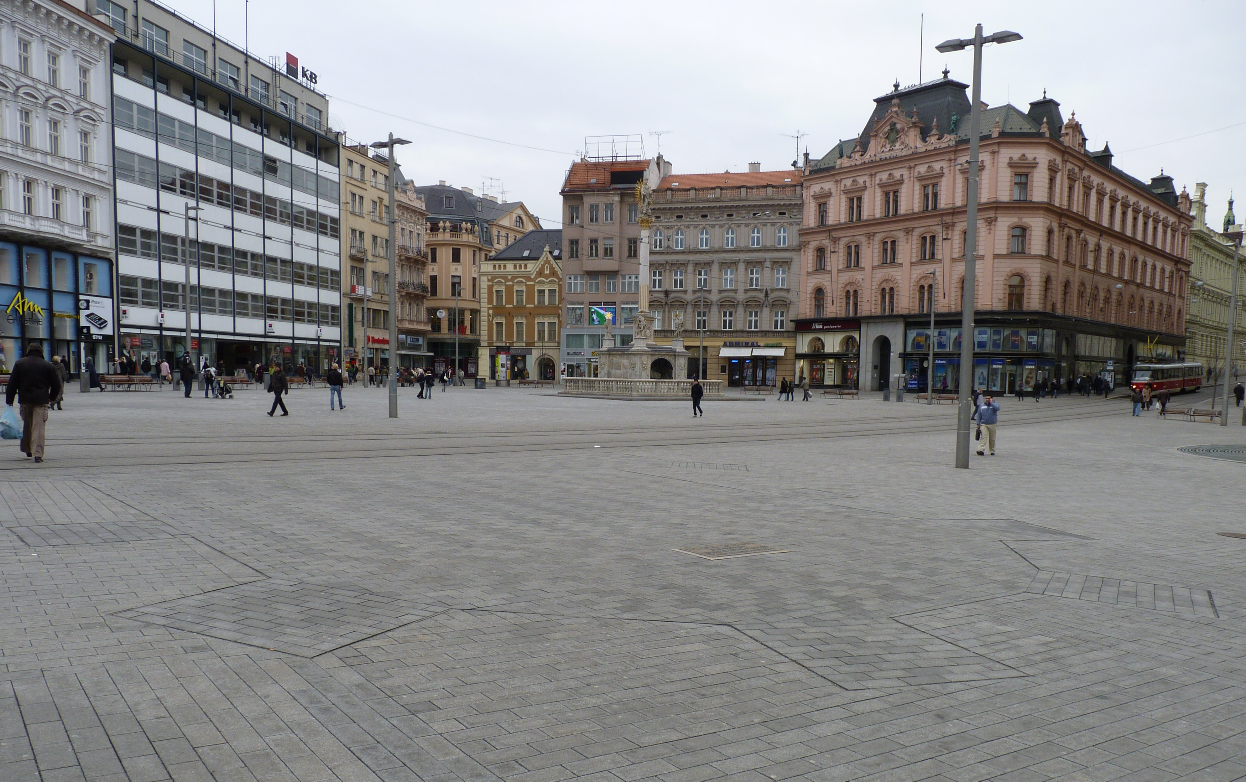 Kostel svatého Mikuláše v Brně - obrys na dlažbě